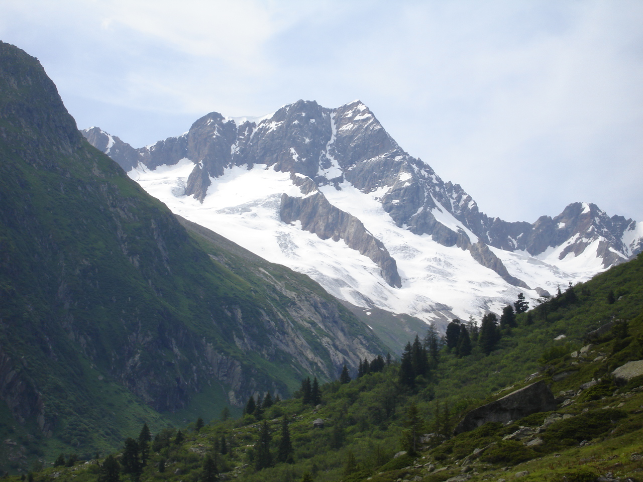 Sustenhorn E-Grat